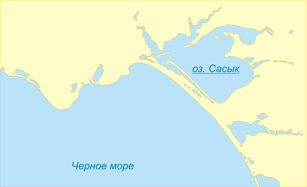 Озера окрестностей гг. Евпатория и Саки